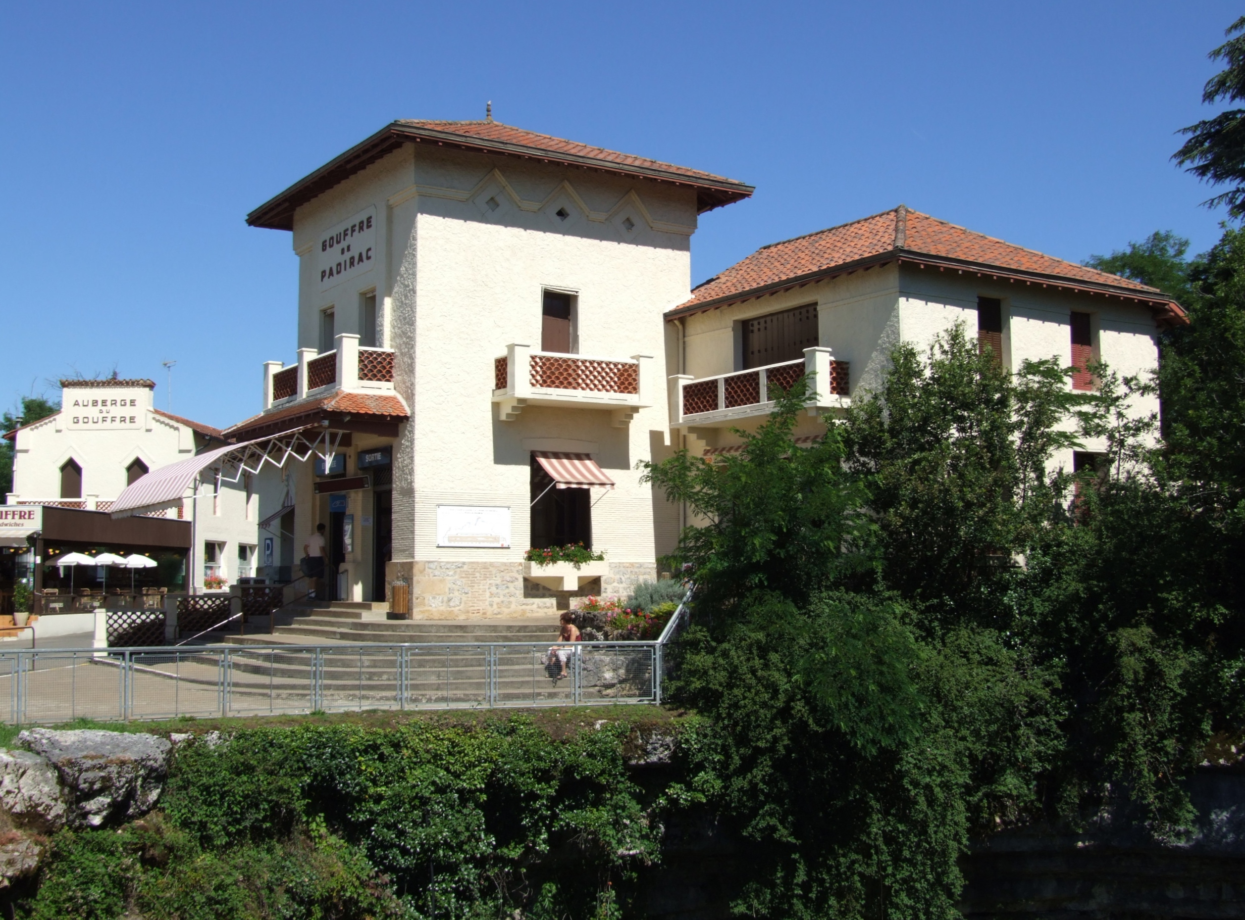 Gouffre de Padirac,FRANCE